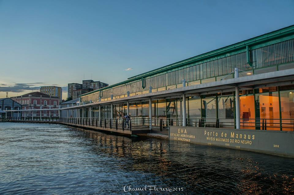 foto do porto de Manaus